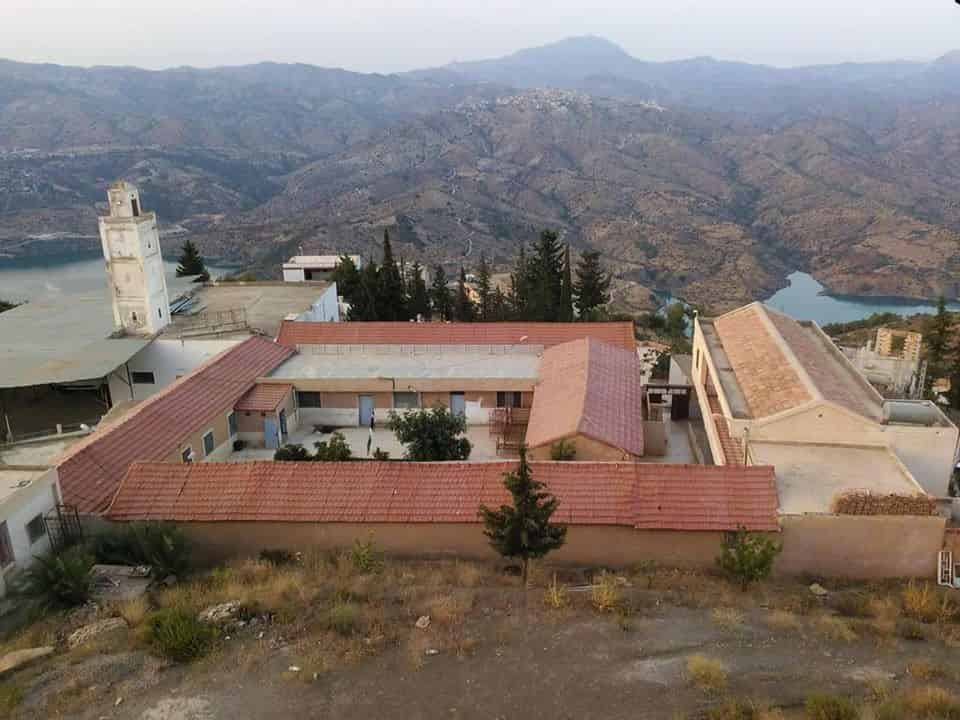 Zawiya (institution) of Sidi Yahia El Aidli Tamokra Bejaia Algeria